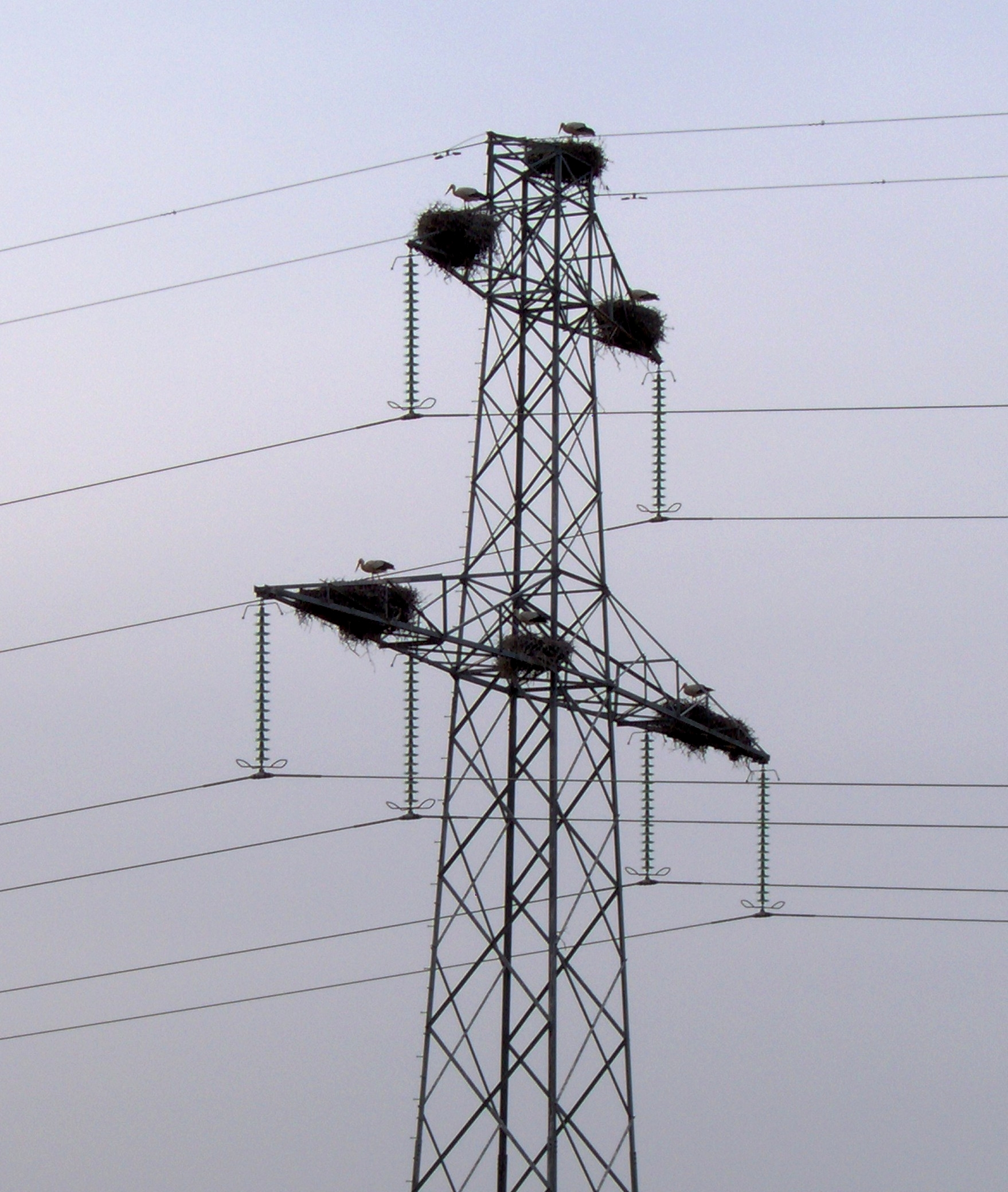 Realizada en el Valle de Alcudia. El uso por parte de las cigüeñas de los postes de alta tensión para la realización de sus nidos es algo común y en ciertas zonas. los postes se saturan de nidos.